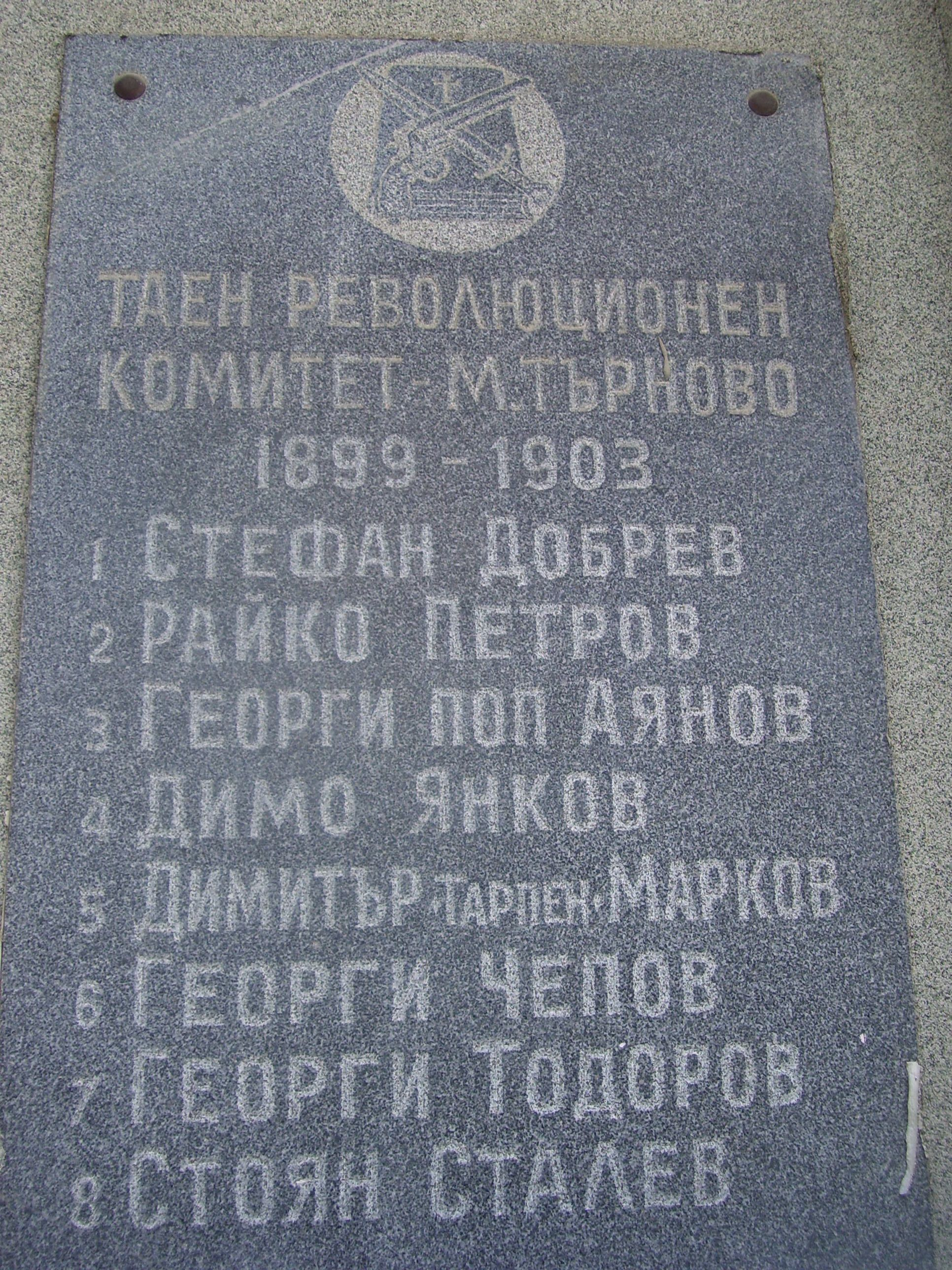 Паметна плоча на Комитета на ВМОРО в Малко Търново.